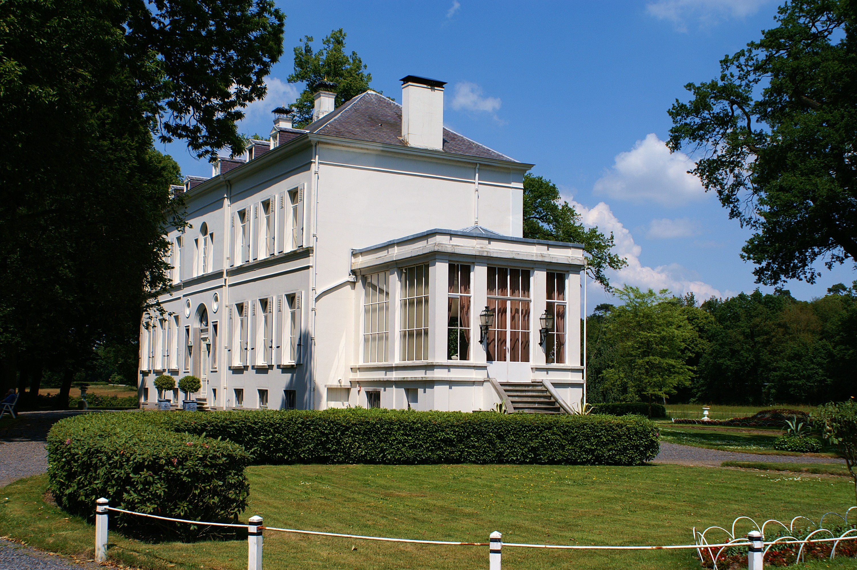 Huize Mattemburgh te Hoogerheide.